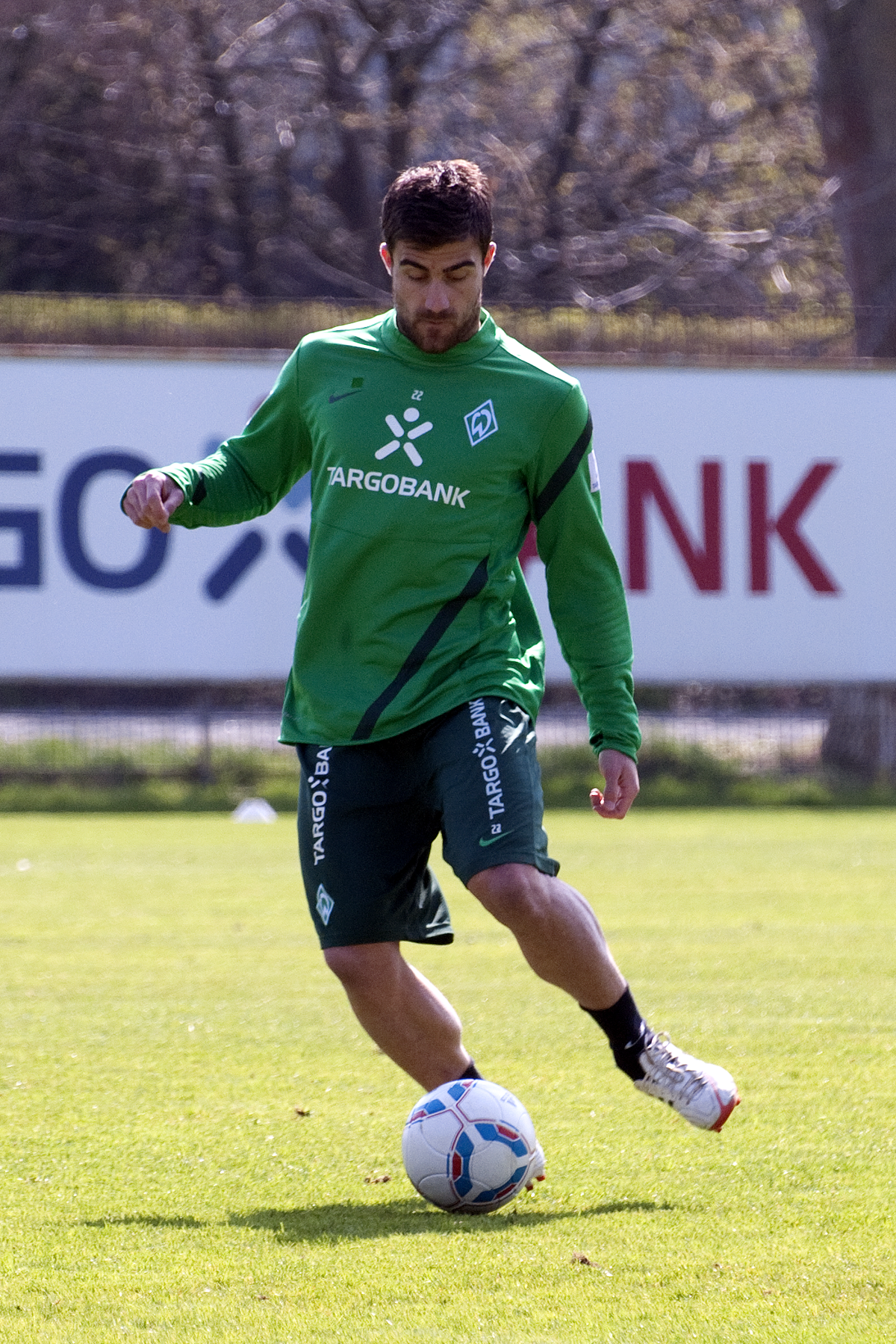 Training 06.04.2012